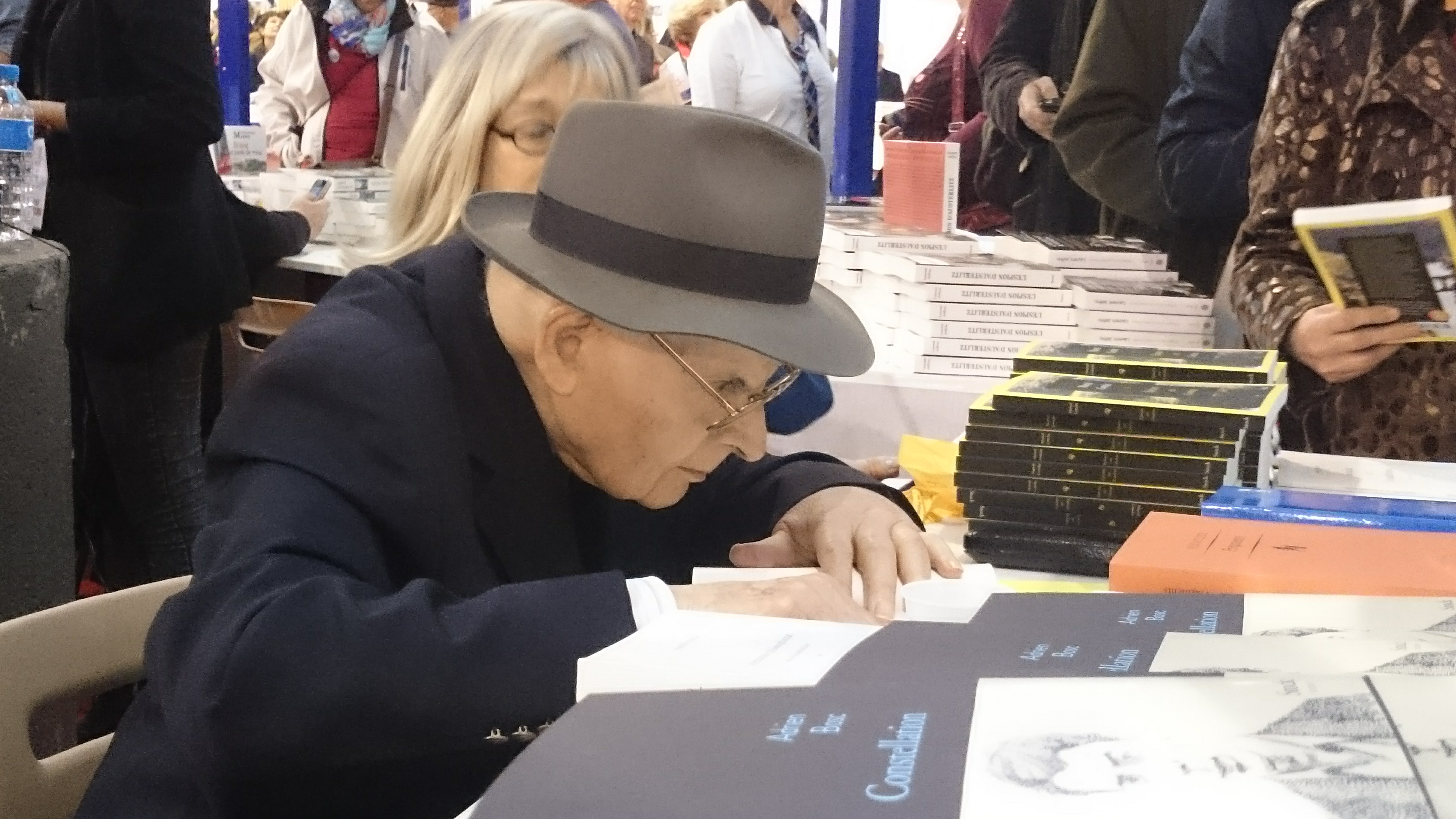 Marcel Conche, Foire du livre de Brive 2014.